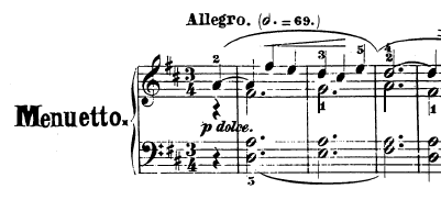 Compassos iniciais do terceiro movimento da Sonata para piano n.º 7, Op. 10 nº 3 de Ludwig van Beethoven